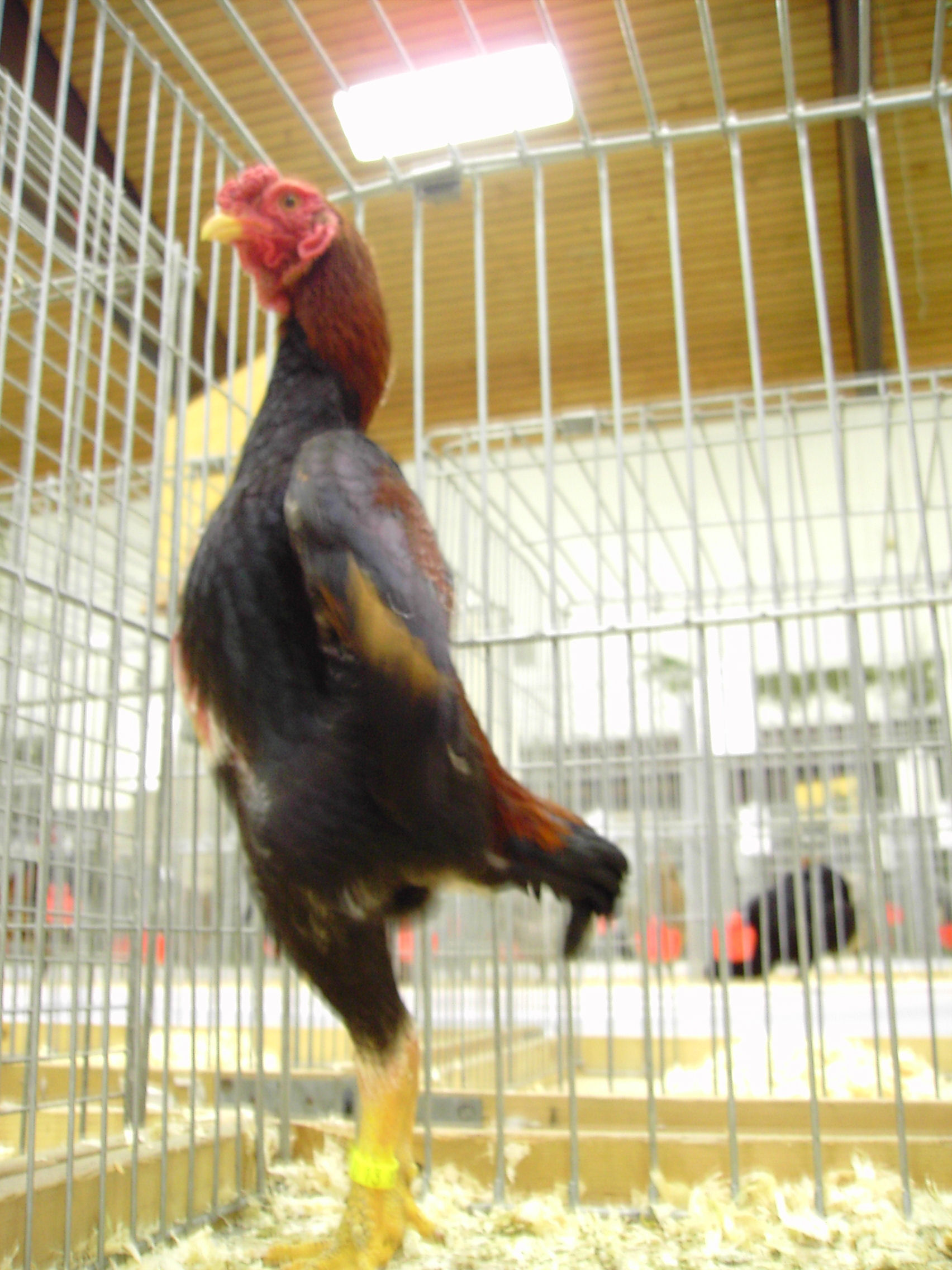 Bildbeschreibung: Ko Shamo Hahn Fotograf/Zeichner: Ko Shamo Datum: 2006-03-19 Sonstiges: ich stelle das Bild zur freien Verfügung